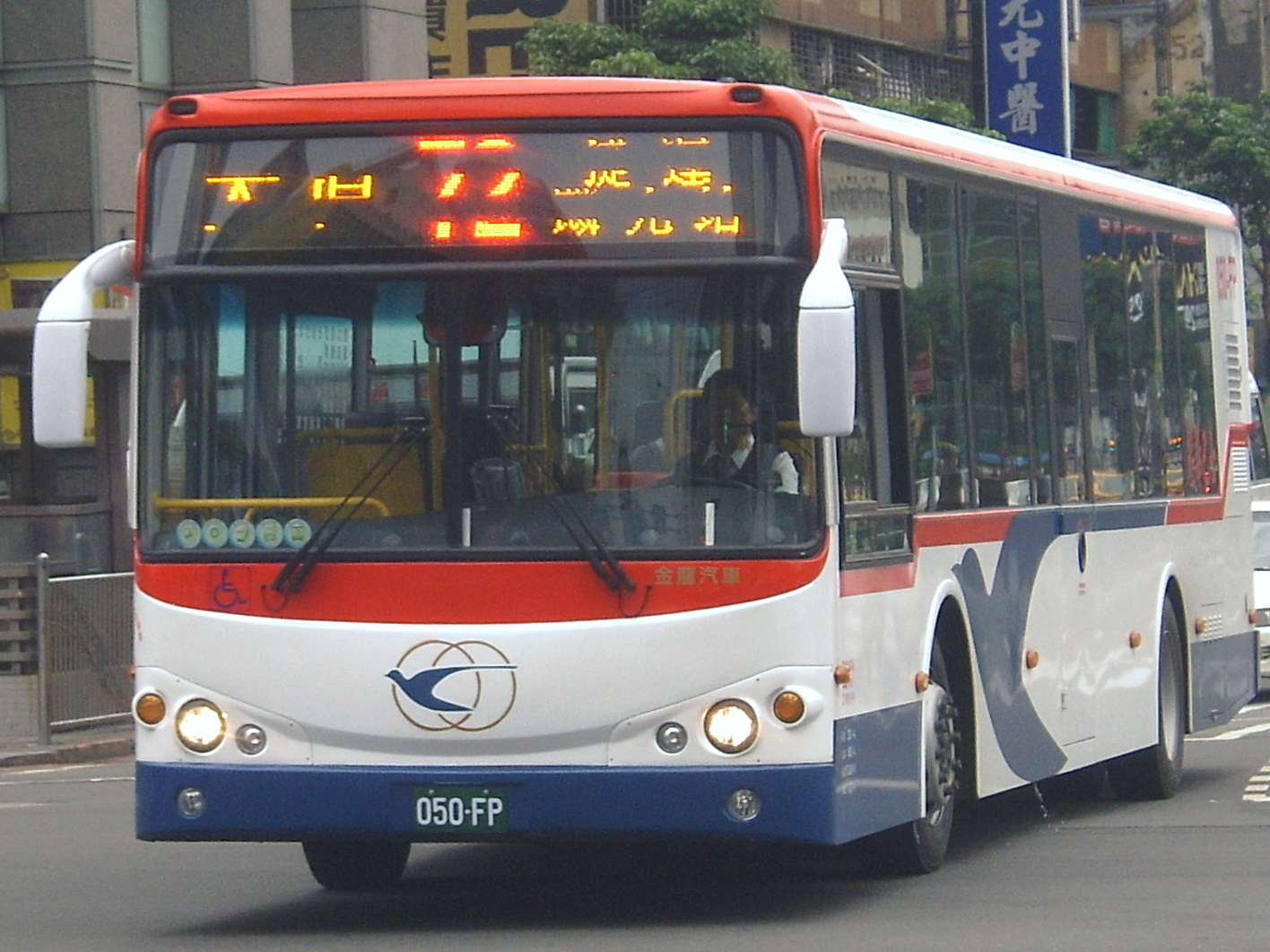 New "Sung-jiang Main Line" bus by Guang-Hua Bus.